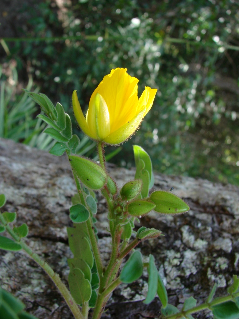 Chamaecrista machaeriifolia (Benth.) H.S.Irwin & Barneby - FABACEAE - Cachoeira do Tororó - Brasília - Distrito Federal - Brasil.